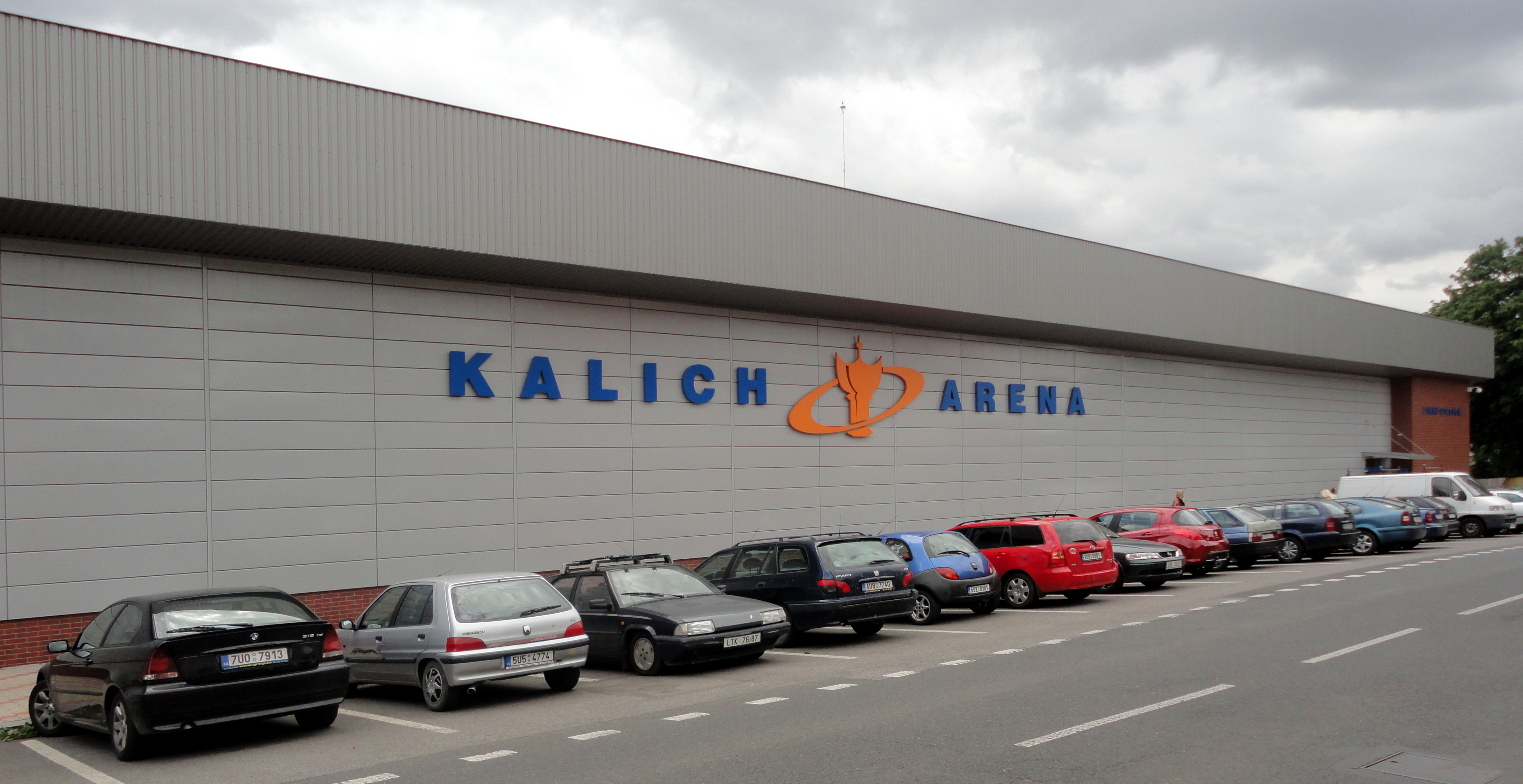 Kalich Aréna v Litoměřicích